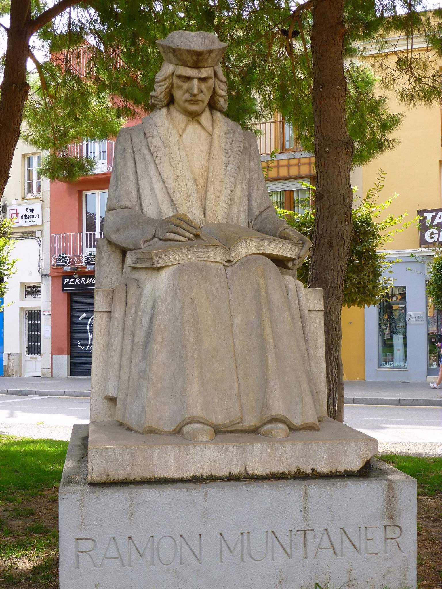 Plaça Ernest Vila (Figueres)